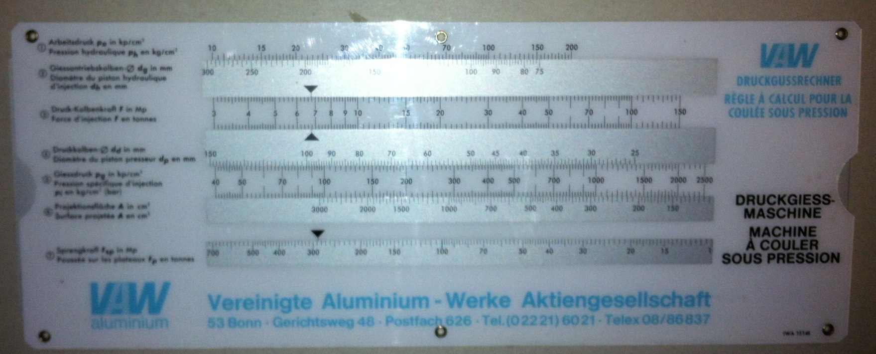 DruckgussrechnerDruckgiesswerkzeug/Moule de Coulee Sous PrecisionDatenschieber der VW AG Bonn, Innenteil Aluminium bedruckt